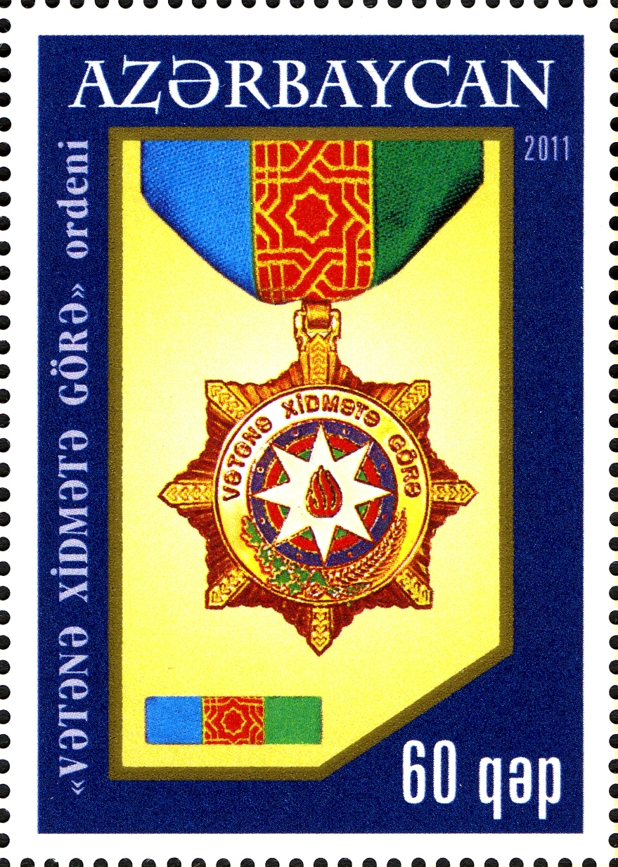 Azərbaycan Respublikasının Ordenləri.